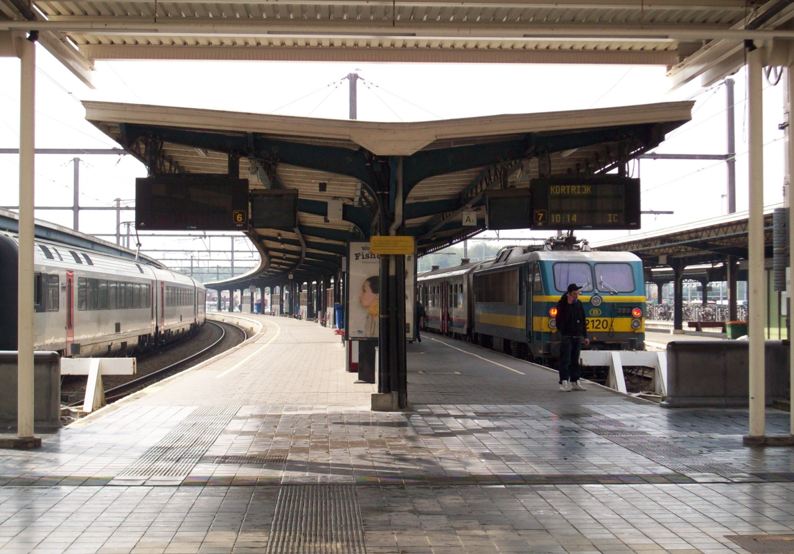 Station Oostende